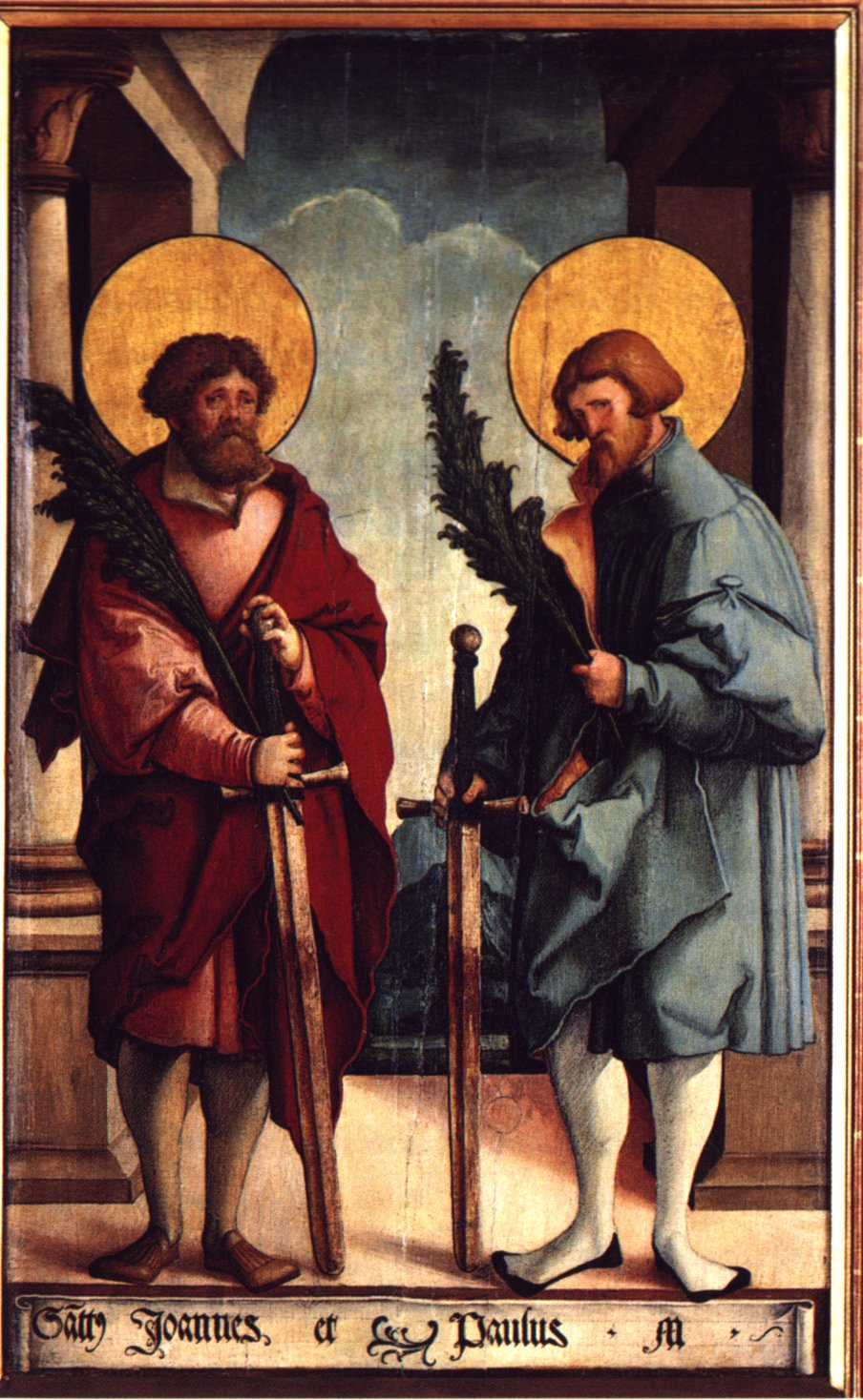 Ausstattung der ehemaligen Seitenaltäre der Meßkircher St. Martinskirche, Standflügel: Heilige Johannes und Paulus von Rom als Märtyrer, zwei nicht zusammenhängende Flügelaußenseiten, nachträglich zusammengesetzt Eingescannt aus: Anna Moraht-Fromm und Hans Westhoff: Der Meister von Meßkirch – Forschungen zur südwestdeutschen Malerei des 16. Jahrhunderts, Ulm, 1997, S. 169